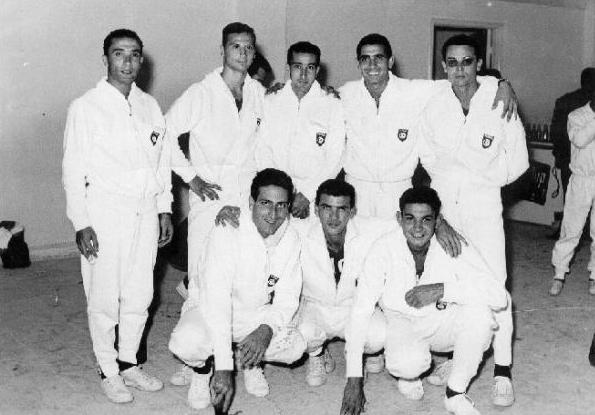 Équipe de Tunisie de volley-ball médaillée d'or des Jeux panarabes Composition : Debout de gauche à droite : Bey - Constantini - Habib Bey - Sitruk - Allouche Accroupis : Cohen - Bismuth - Boublil